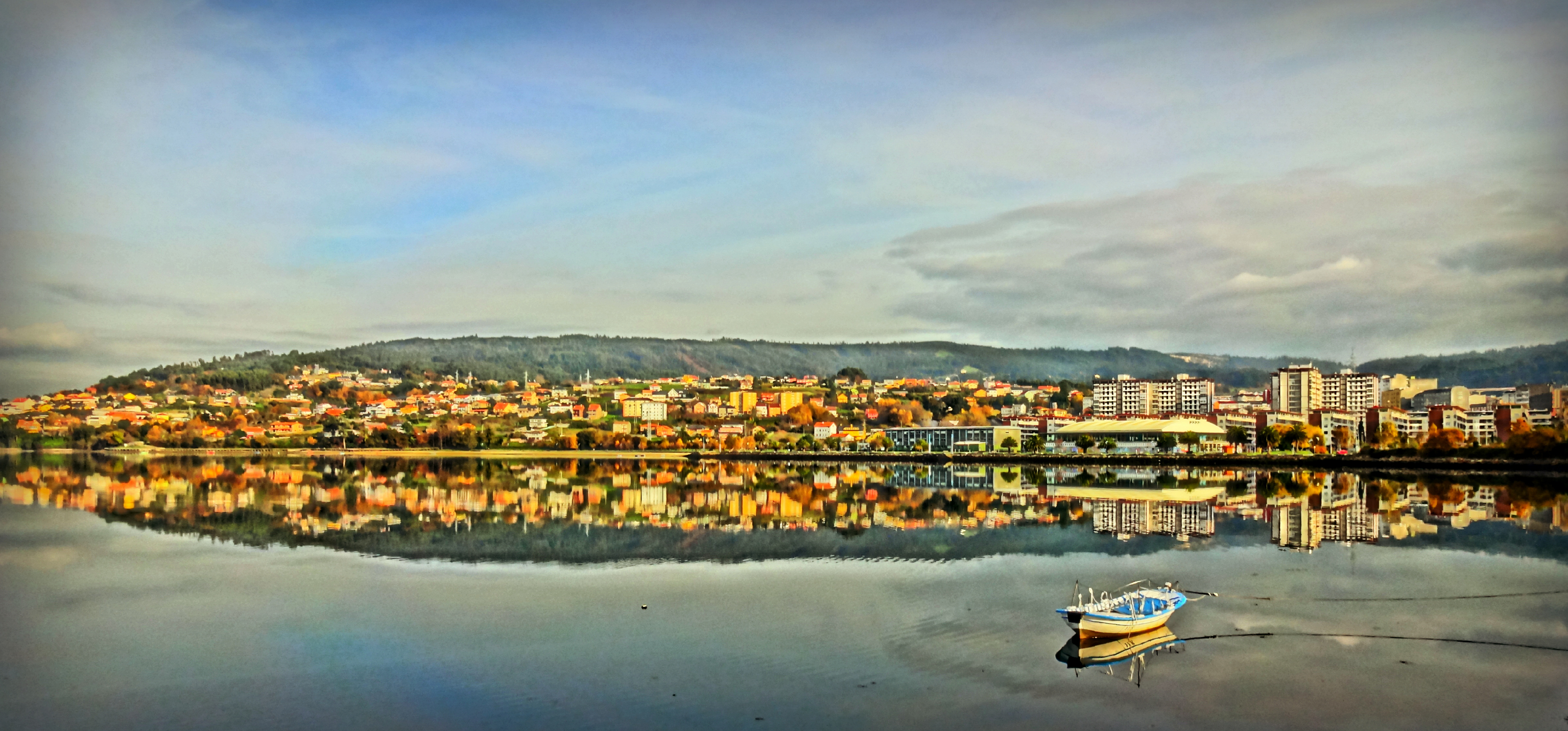 San Valentín